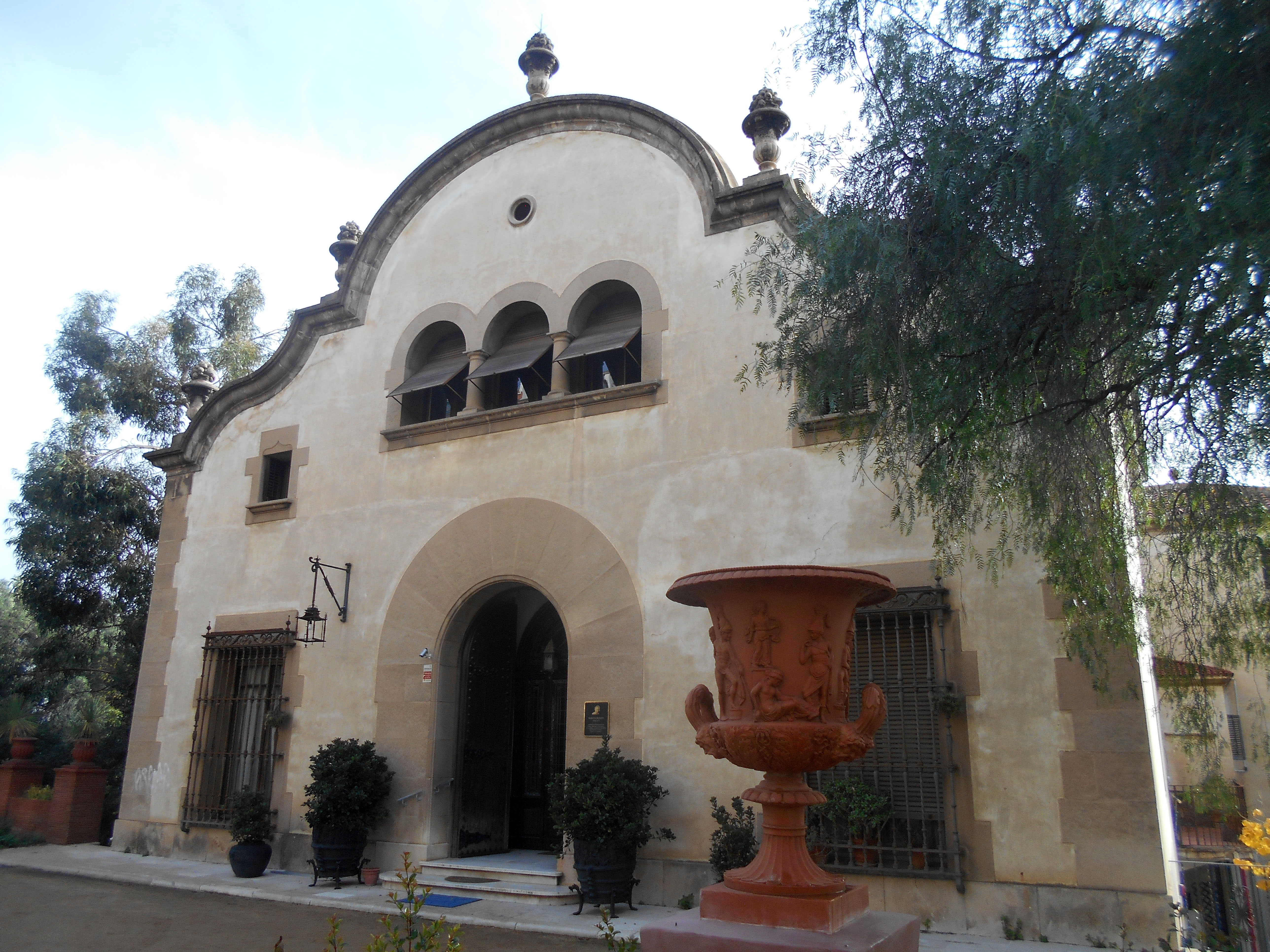 Jardines del Doctor Pla i Armengol. Instituto Ravetllat-Pla.